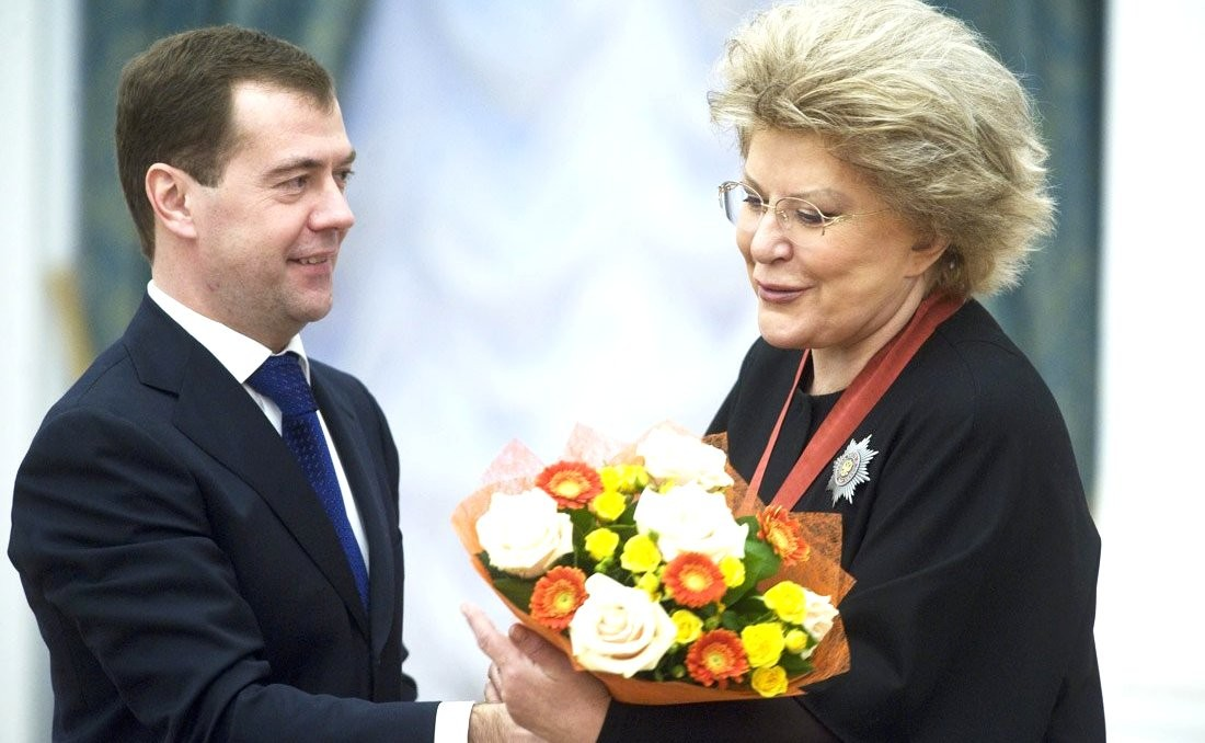 Церемония вручения государственных наград. Орденом «За заслуги перед отечеством» II степени награждена Елена Образцова – солистка оперы.